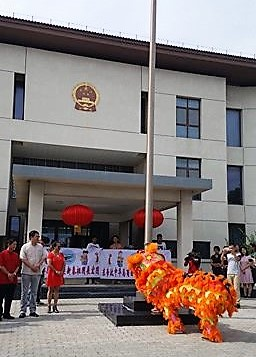 Chinesisches Neujahr chinesische Botschaft in Dili, Osttimor